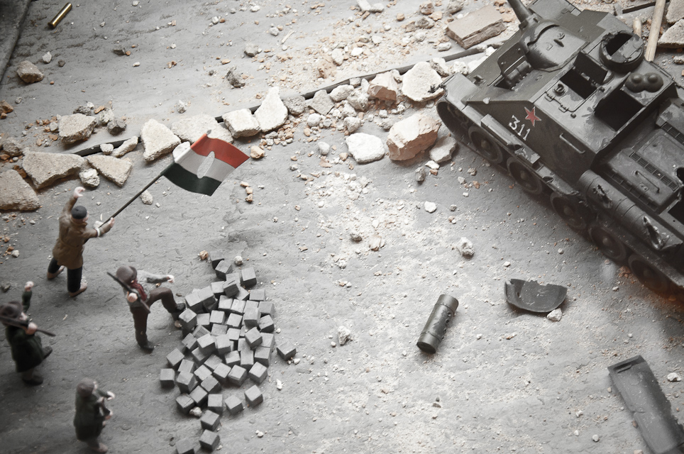 Az Ópusztaszeri Történelmi Emlékparkban diorámák mutatják be, 1:35 léptékű figurákkal és eszközökkel az 1800 év Kárpát-medencei történetét, Attila temetésétől az 1956-i magyar szabadságharcig (ez a "kis-körkép"). A 15 dioráma: 1.Attila temetése 453. 2.Szeri országgyűlés 896. 3. Árpádkori település 1020. 4.Szent István kori templomépítés 1030. 5.Barbarossa Frigyes fogadása Esztergom alatt 1189. 6.Budavár építése IV.Béla idején 1249. 7.Visegrádi királytalálkozó 1335. 8. Nándorfehérvári diadal 1456. 9.Marosvásárhelyi országgyűlés 1571. 10. Báthory István az Ojtozi szoroson át vonul 1575. 11. Budavár visszafoglalása 1686 . 12.Kuruc rajtaütés a császári postán 1707. 13.Huszártábor Mária Terézia korában 1756. 14.Piski csata 1849. '15. Corvin köz 1956. '